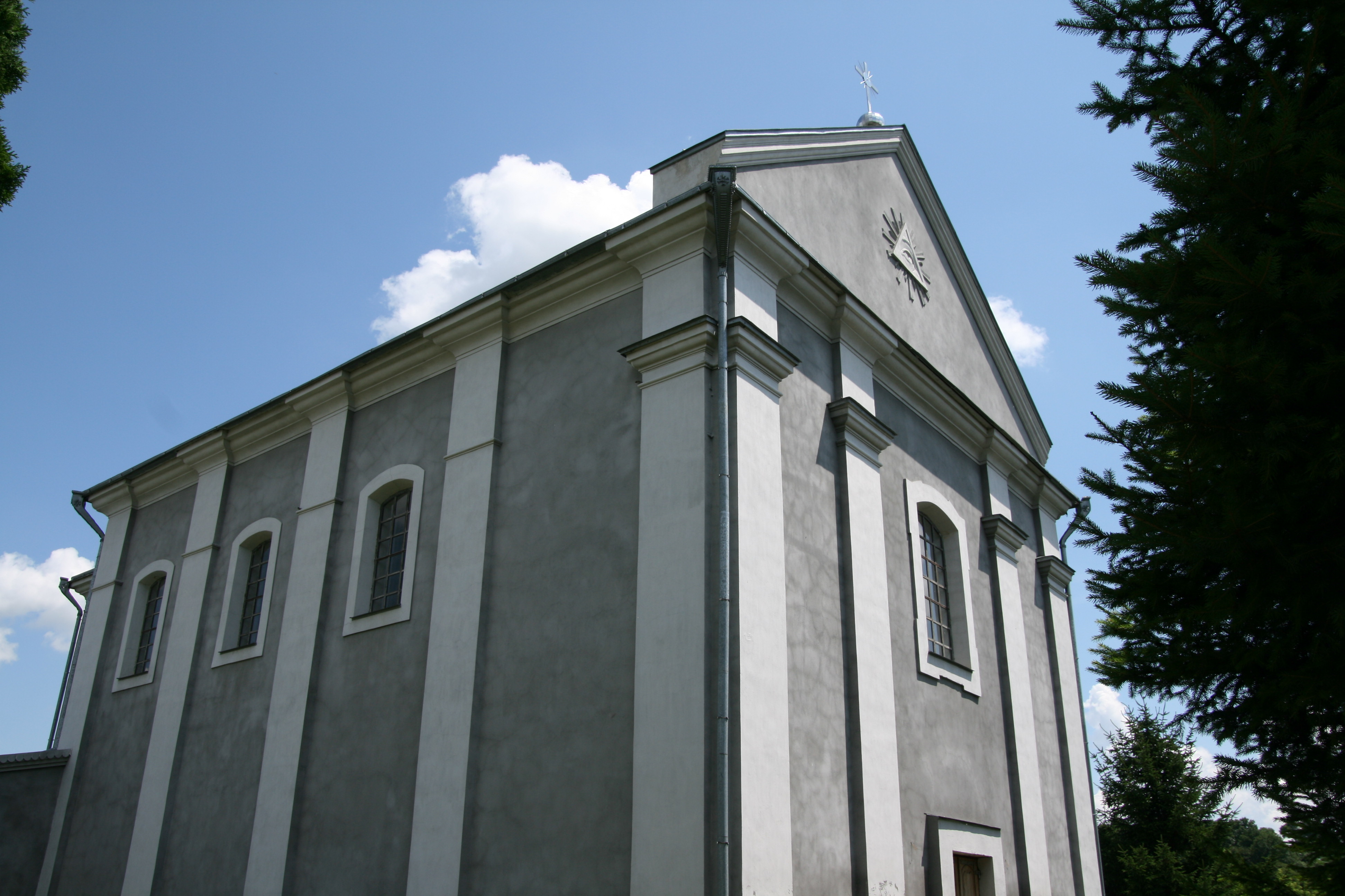 Костьол Святого Духа, Барський район, с.Копайгород